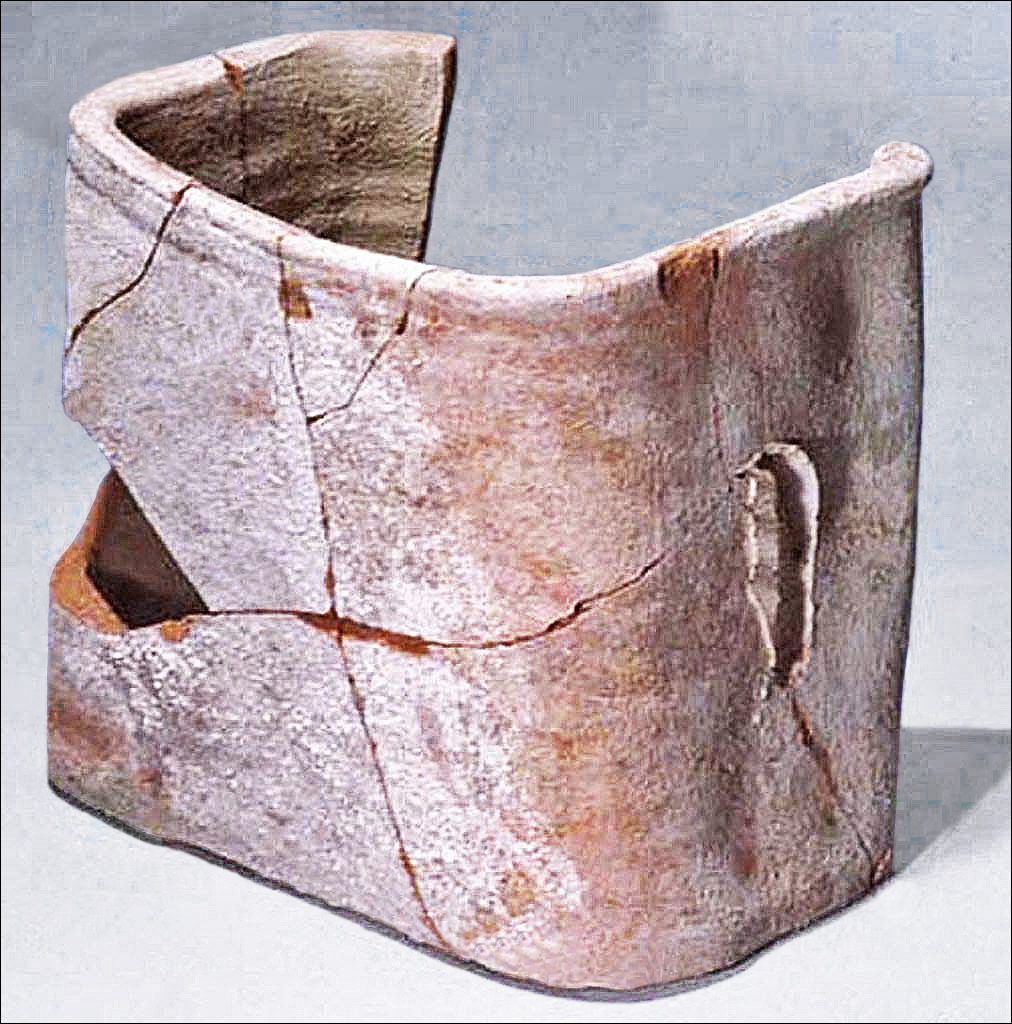 Résidence ez Zantur IV. Rooms 14 et 29. Gaine d’air chaud en terre cuite.